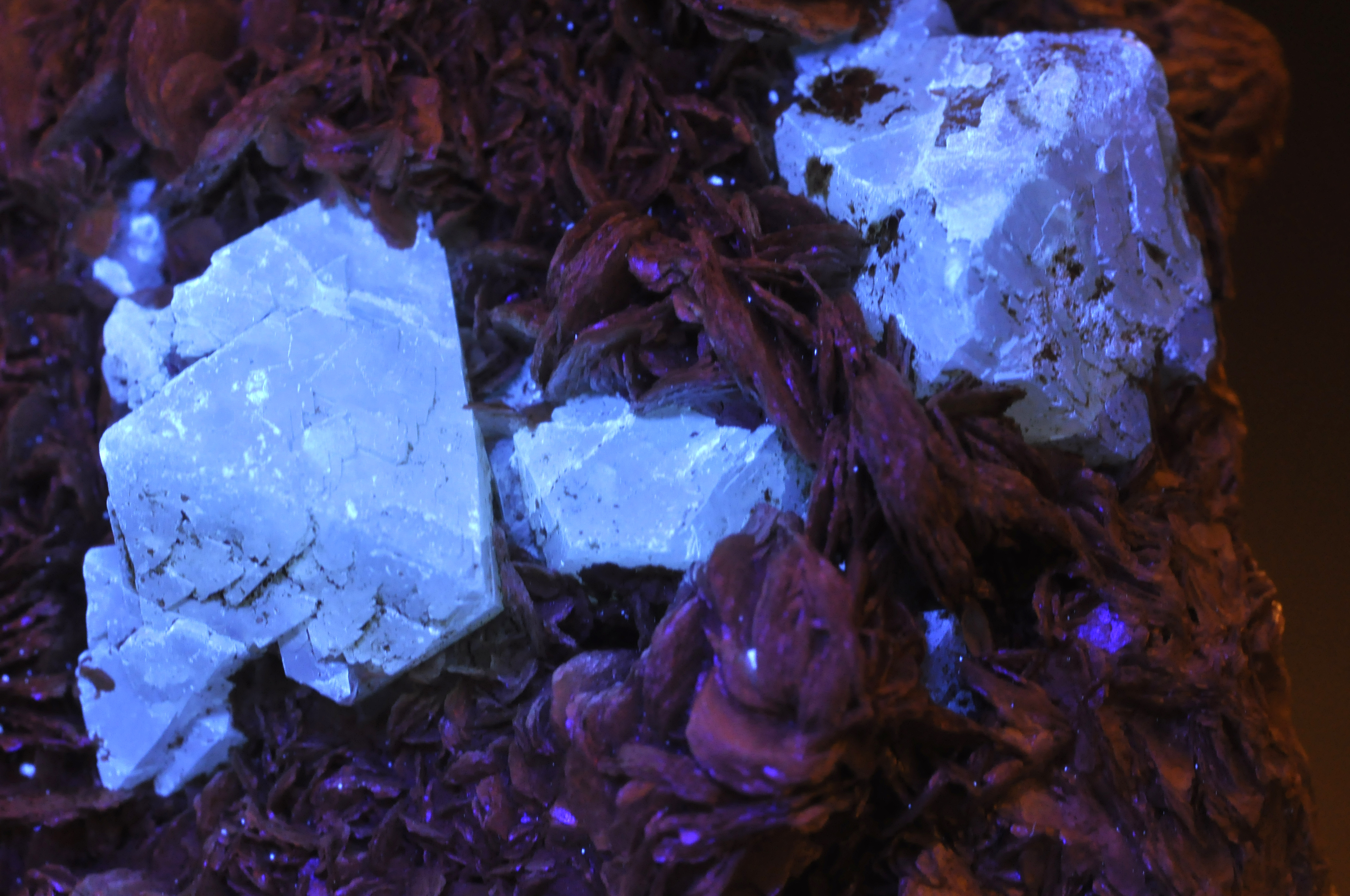 fluorescence de cristaux de scheelite et de mica var. muscovite sous rayonnement ultra-violet.